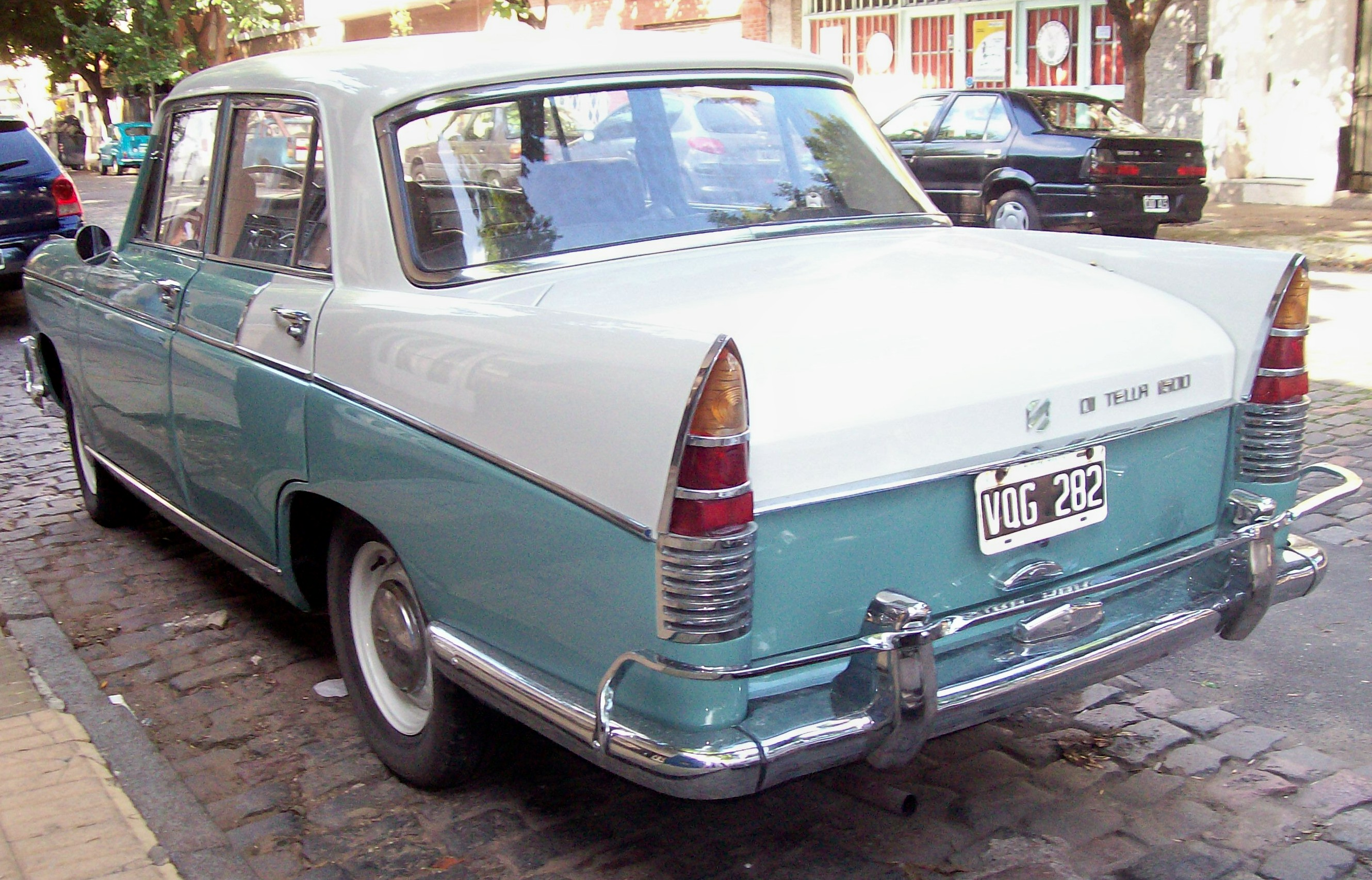 Siam Di Tella 1500 estacionado en el barrio de Chacarita, Buenos Aires. Fue utilizado en la película "Master Plan" dirigida por Pablo Levy y Diego Levy.